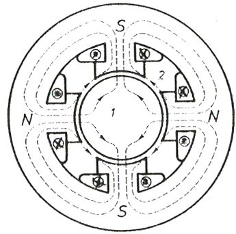 Figura 9.Makina katerpolare me pole të theksuara në stator